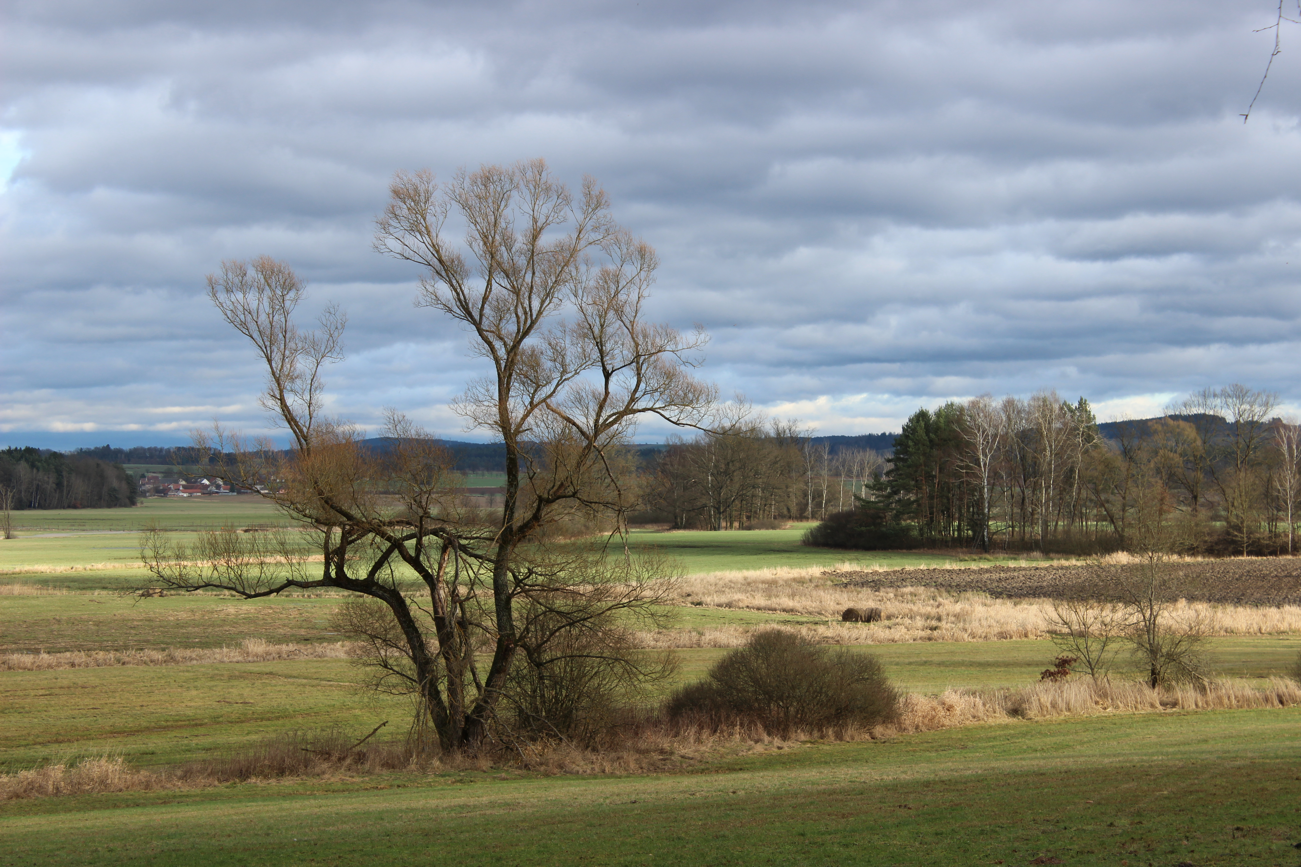 Přírodní park Turovecký les. Turovecký potok. Lokalita Na Bahnech. Zatopené louky u silnice Turovec - Měšice. Okres Tábor. Česká republika.